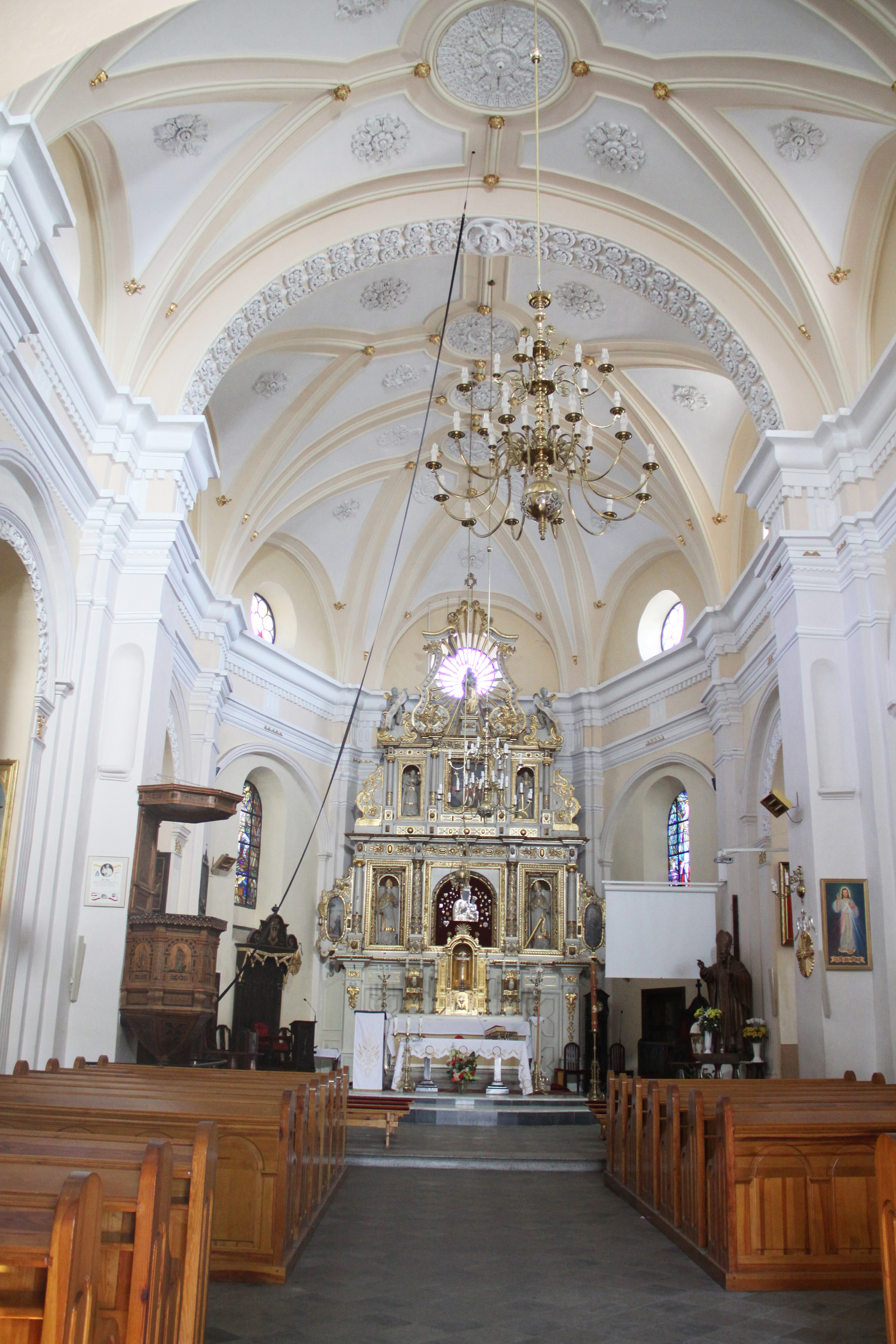 Poddębice - kościół pw. św. Katarzyny Dziewicy i Męczennicy